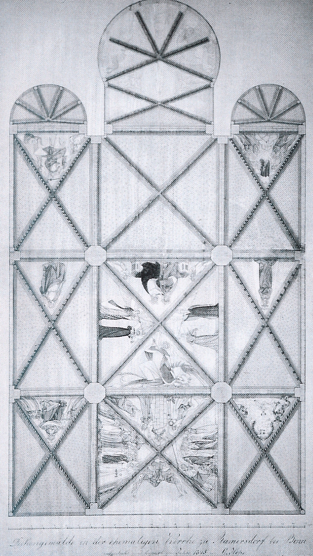 Christian Hohe: Übersichtsplan der Gewölbemalereien der Georgskapelle, Reinzeichnung von 1845